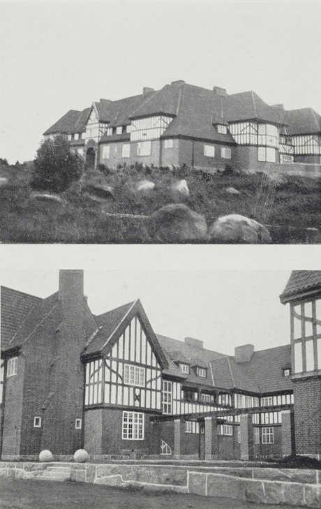 Hyltenäs jaktslott, Sundholmen. Byggnadsår 1915-1916. Arkitekt Karl Severin Hansson. Nedbrunnet 1923